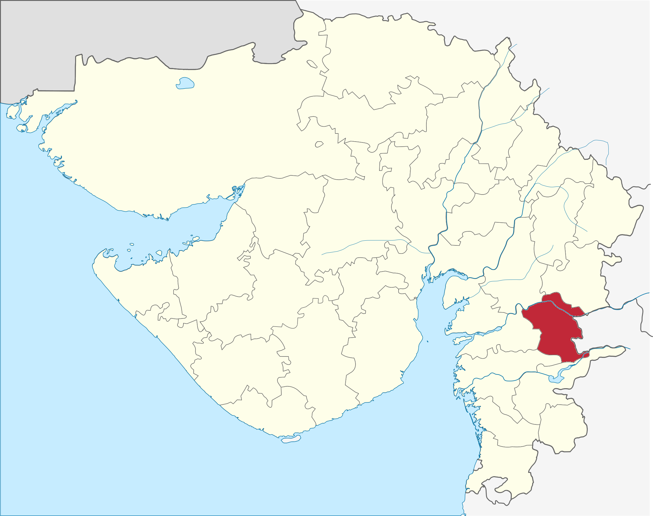 Distrito de Narmada en Gujarat